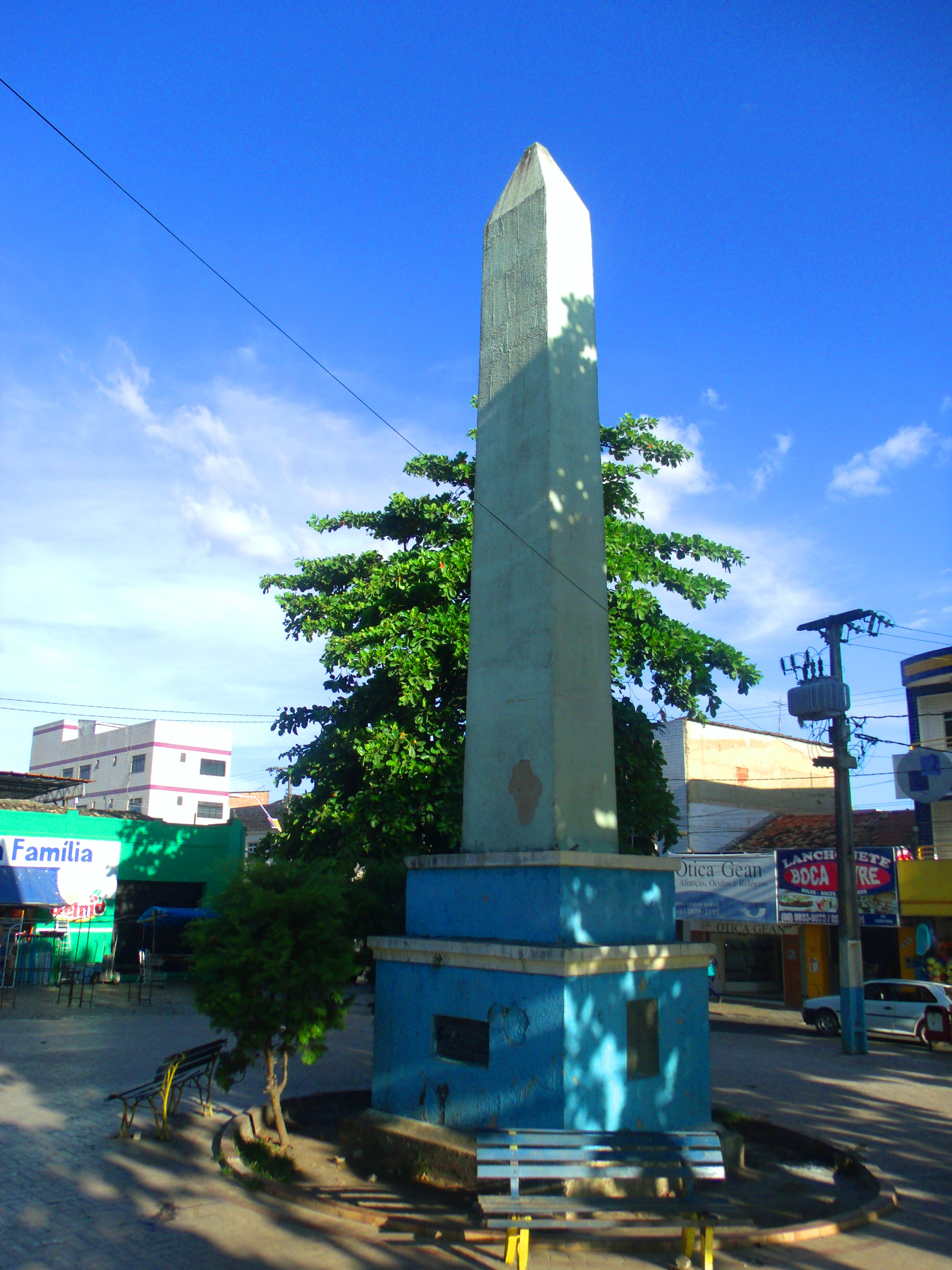 Obelisco de São Benedito, erigido em 1973, em homenagem ao primeiro centenário do município.